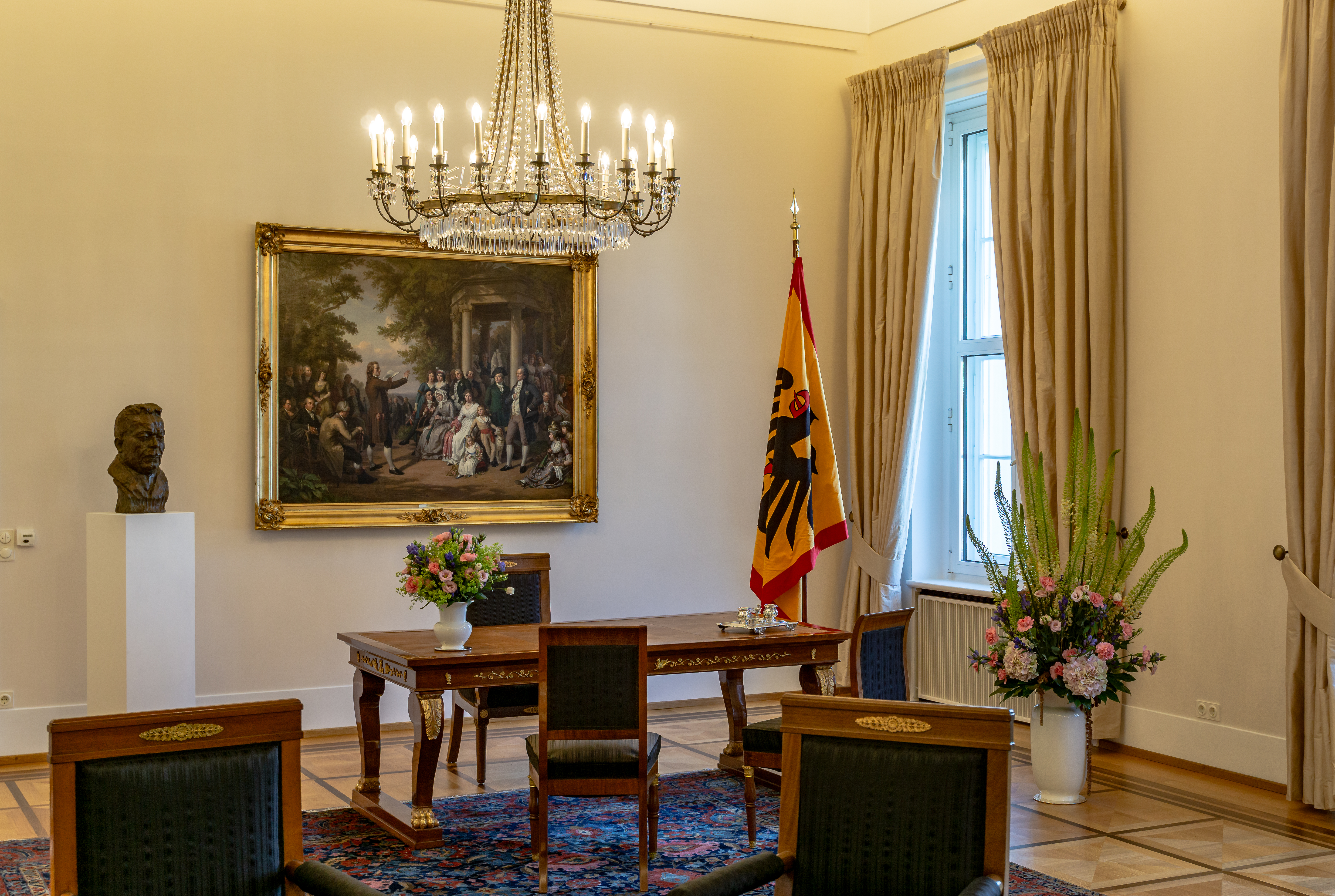 Bürgerfest des Bundespräsidenten 2019: Schloss Bellevue - Amtszimmer